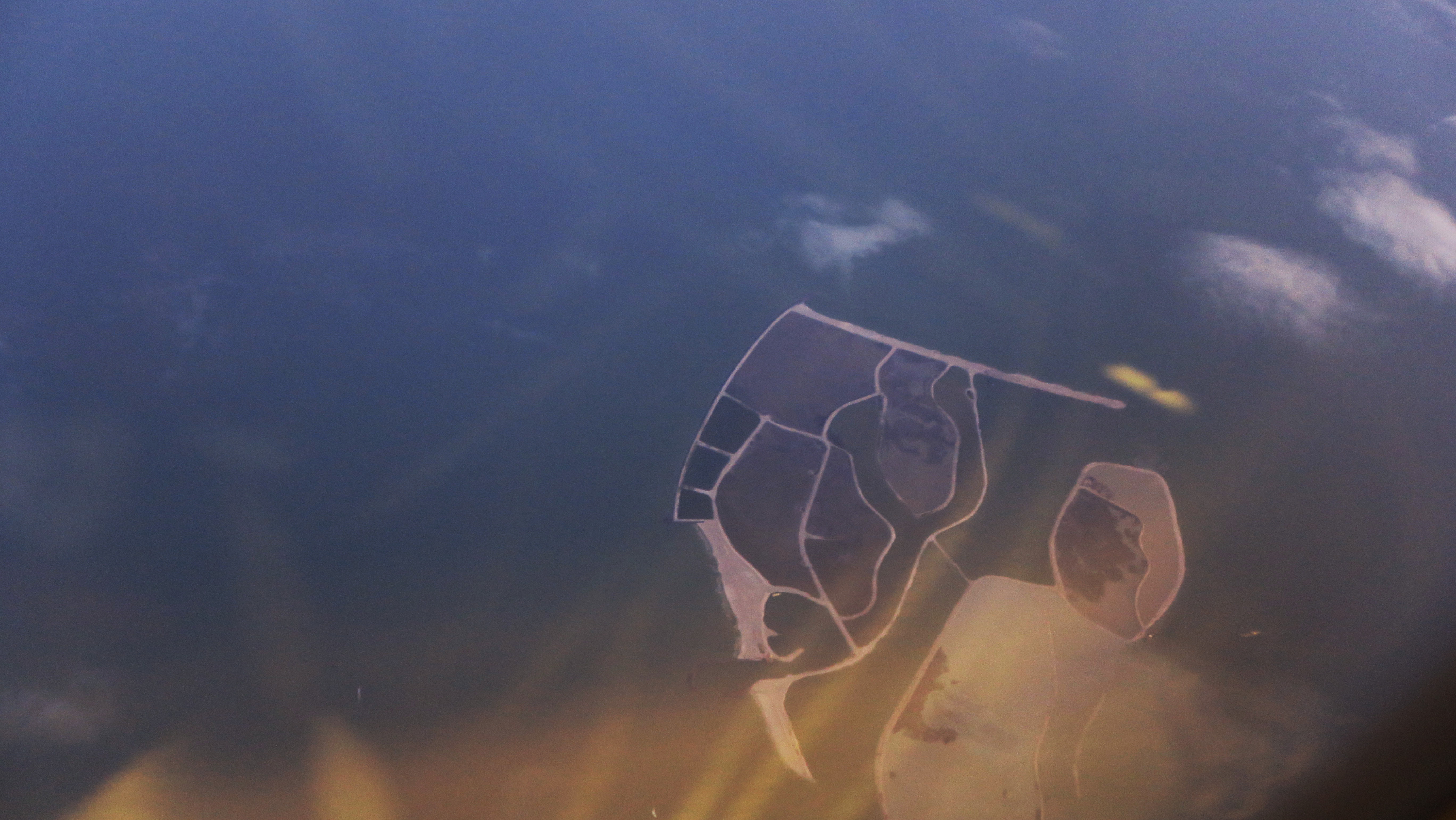 Markerwadden, gezien naar het noordwesten